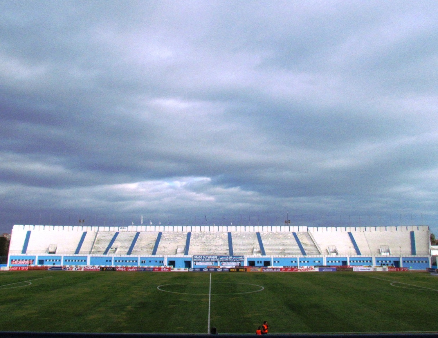 Stade Mustapha-Ben-Jennet avant le derby tunisien entre l'Espérance Sportive de Tunis et le Club Africain le 6 janvier 2019 qui a vu la victoire de l'EST (2-1)